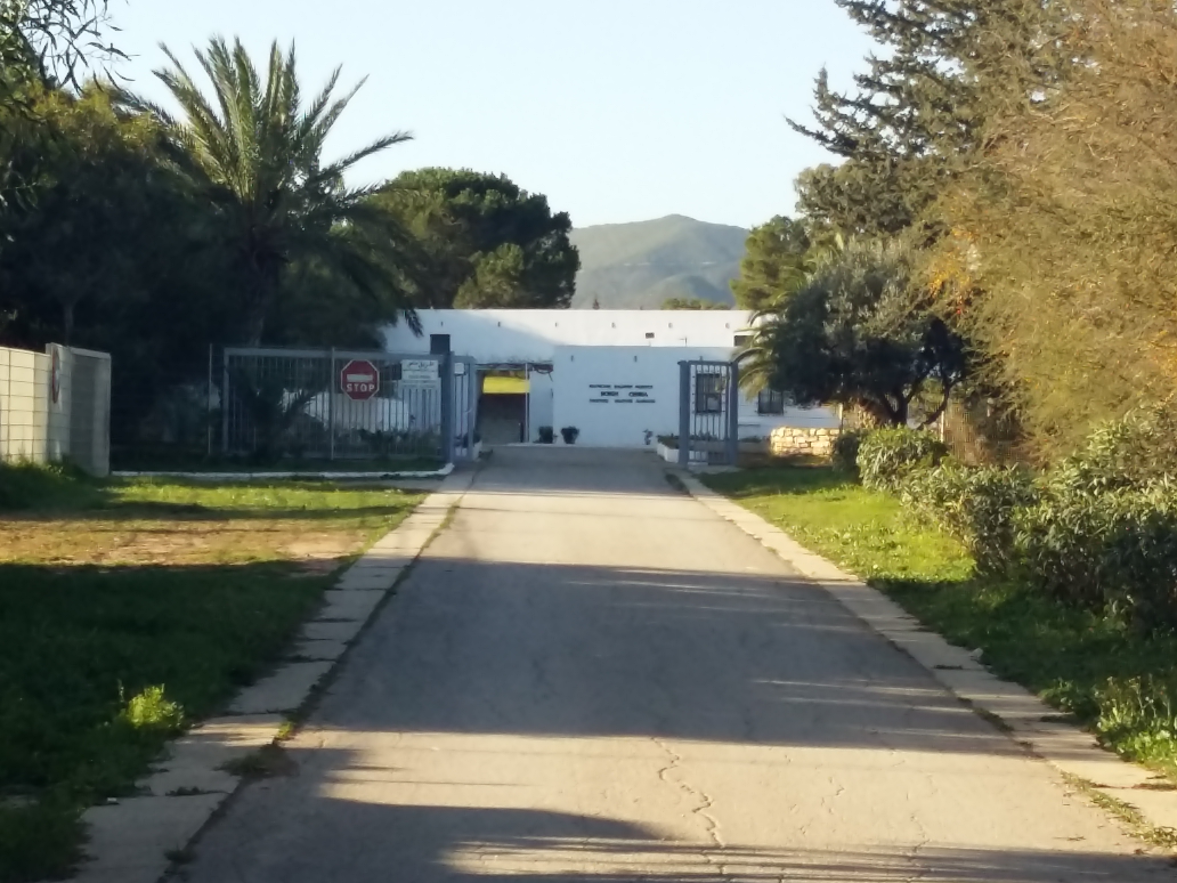 Cimetière militaire allemand de Borj Cédria